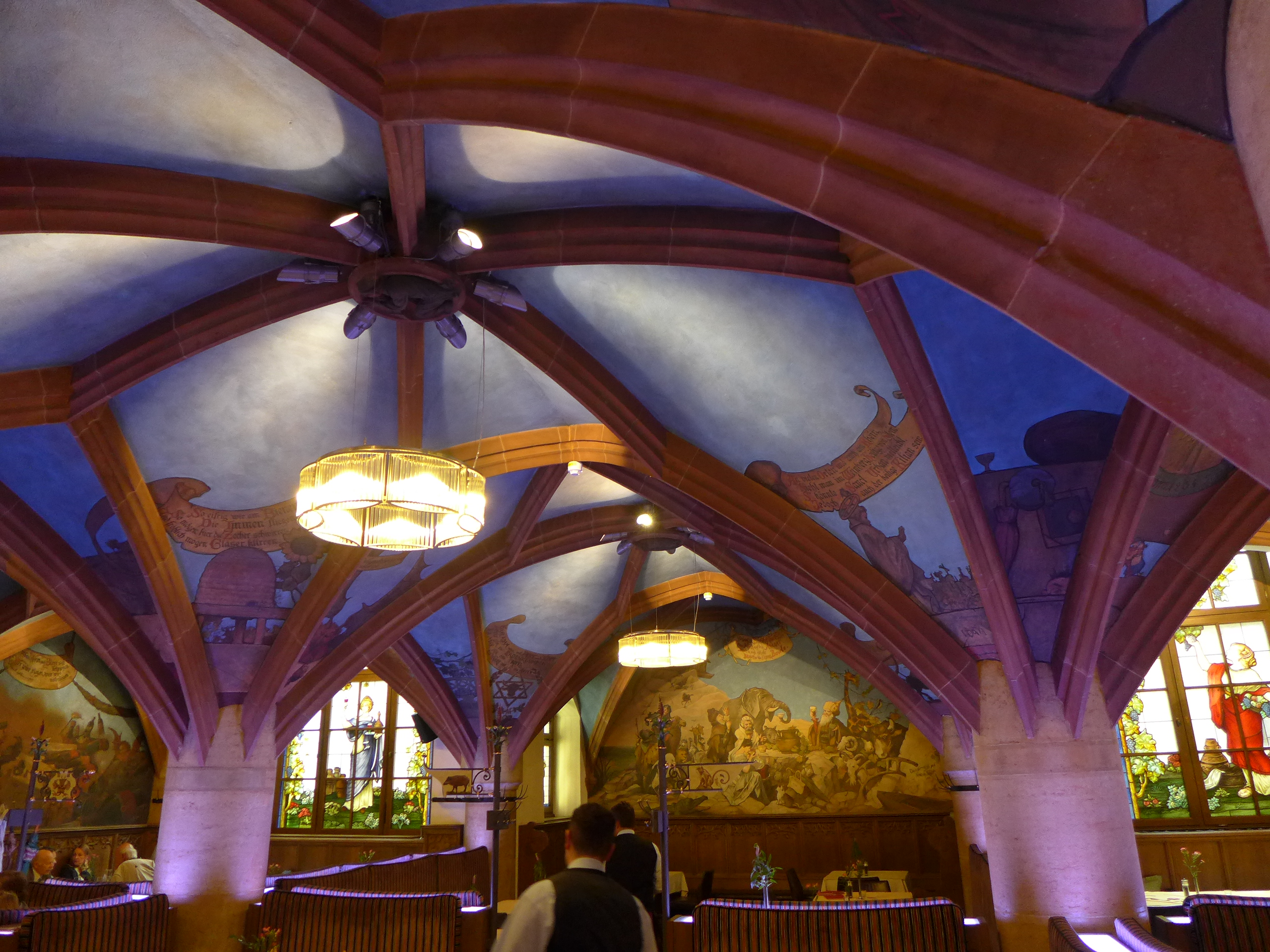 Ratskeller Neues Rathaus (München); Detail der Gewölbemalerei, die ursprünglich von Heinrich Schlitt für den Ratskeller des Rathauses St. Johann entworfen worden war